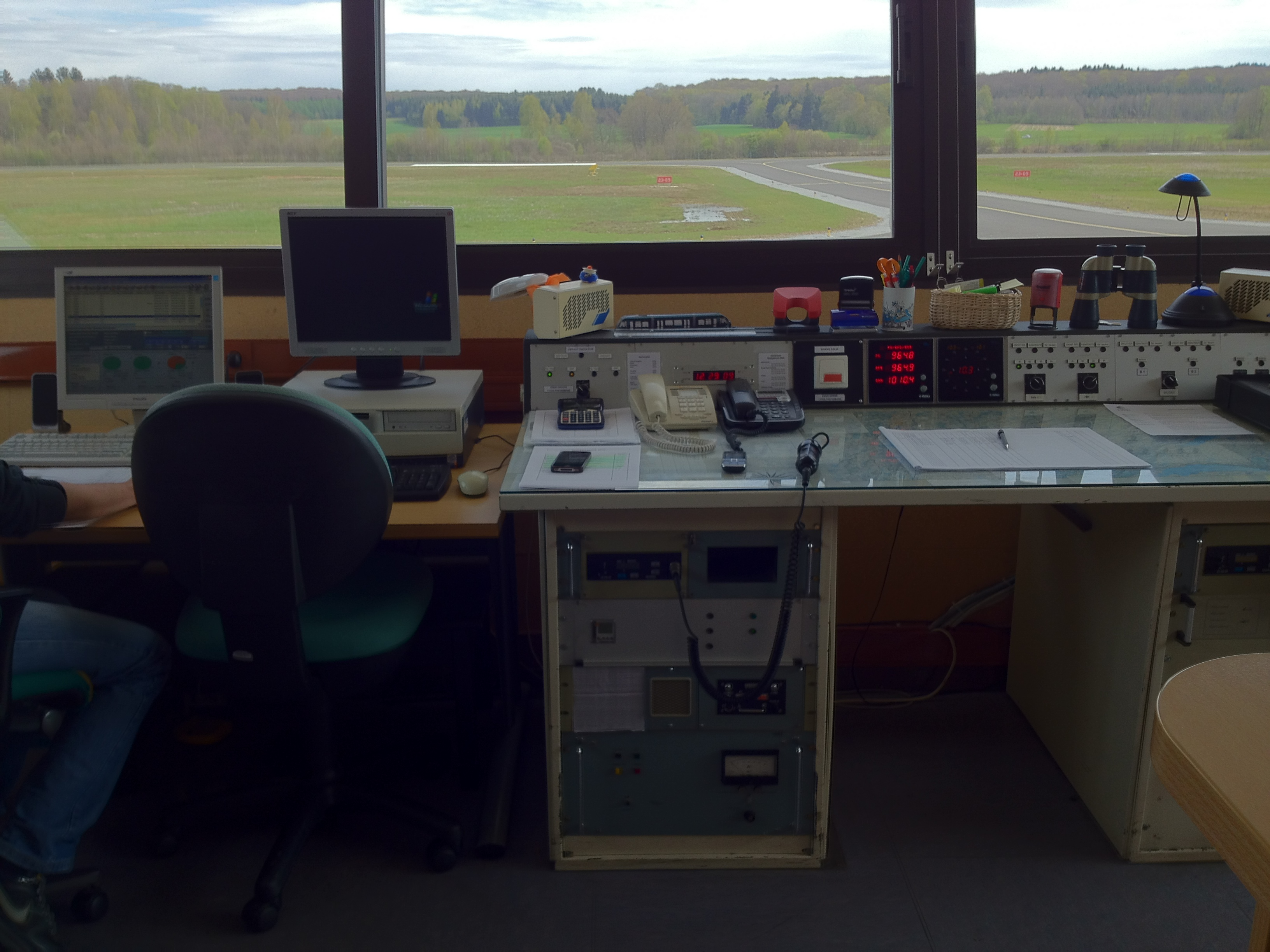 Tour de contrôle de Besançon La Vèze (LFQM)